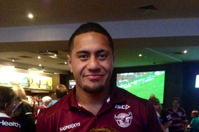 Jorge 2014